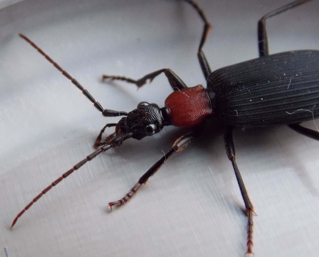 Adulto de Galerita collaris fotografiado en Dique Luján, Buenos Aires, Argentina.